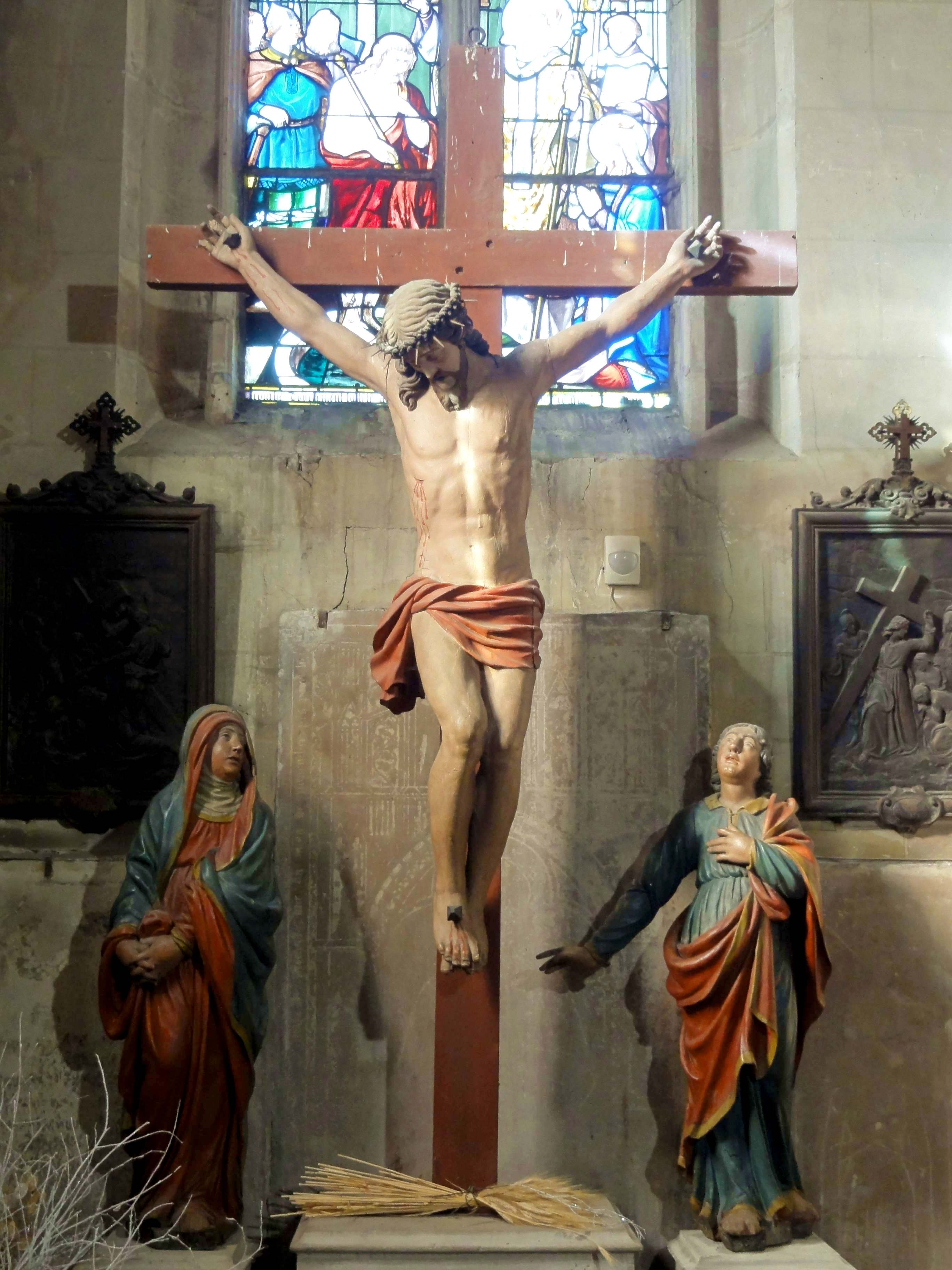 Voir titre.